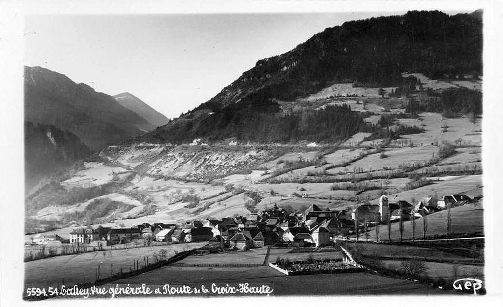 Vue générale de Lalley et route de la Croix-Haute. Carte postale ancienne.